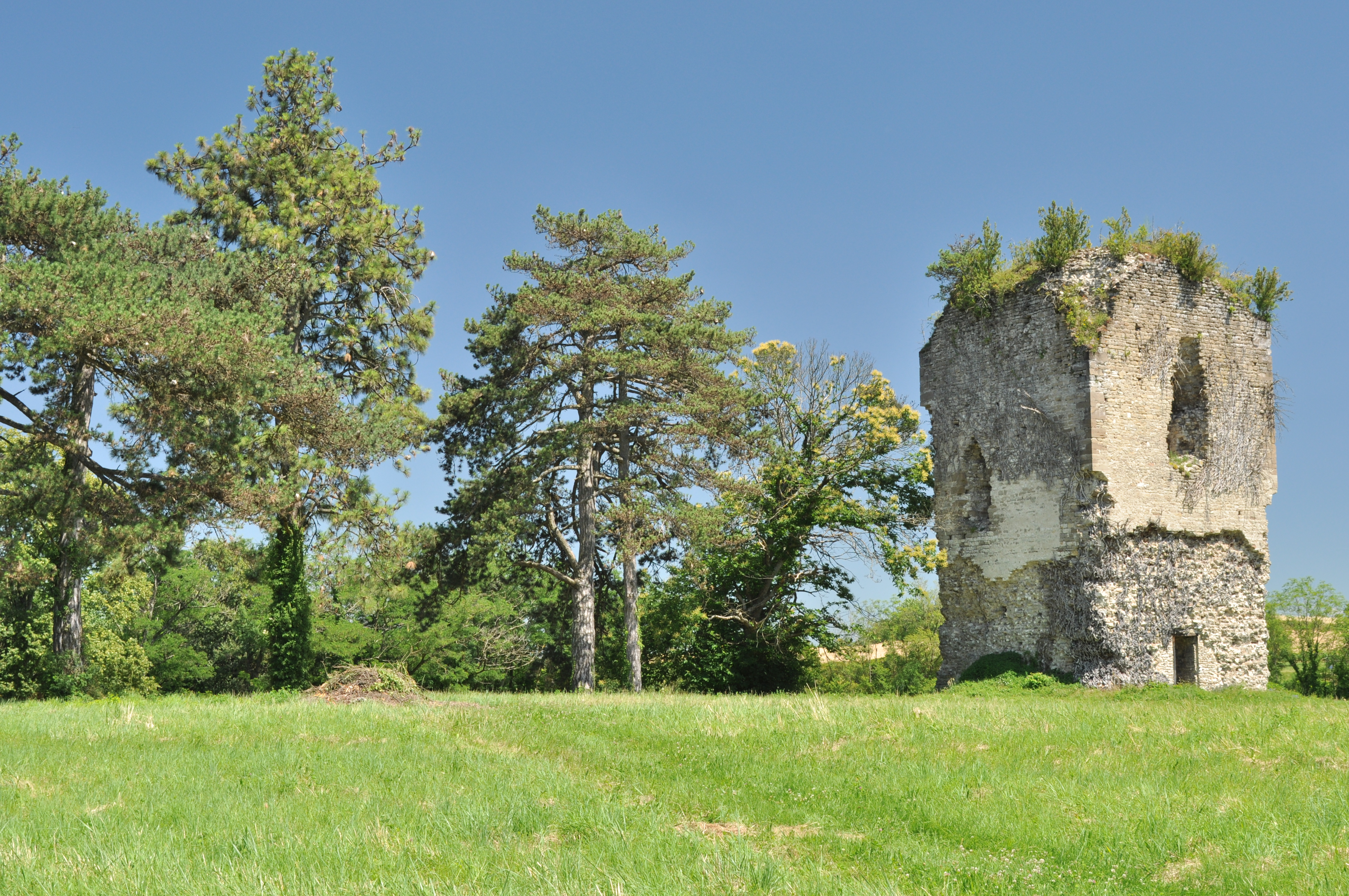 ruines de la Tour du Poulet